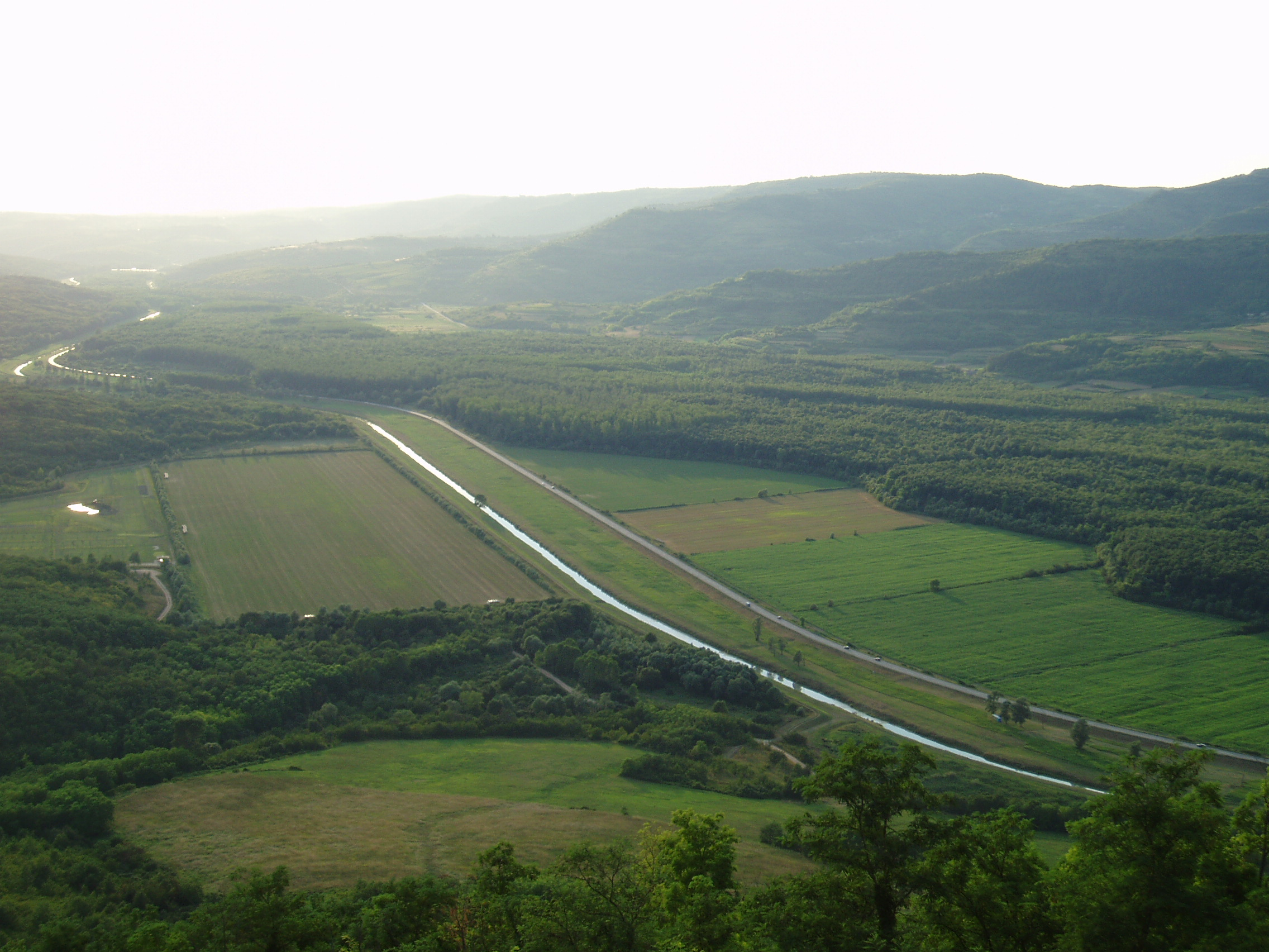 Mirna